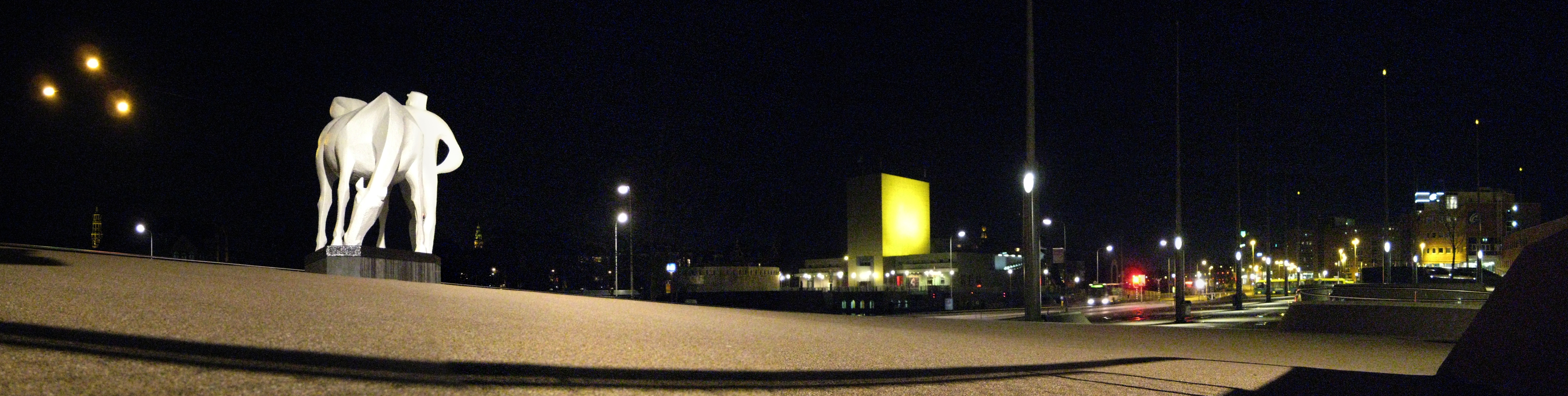 Peerd van Ome Loeks, Groningen, NL